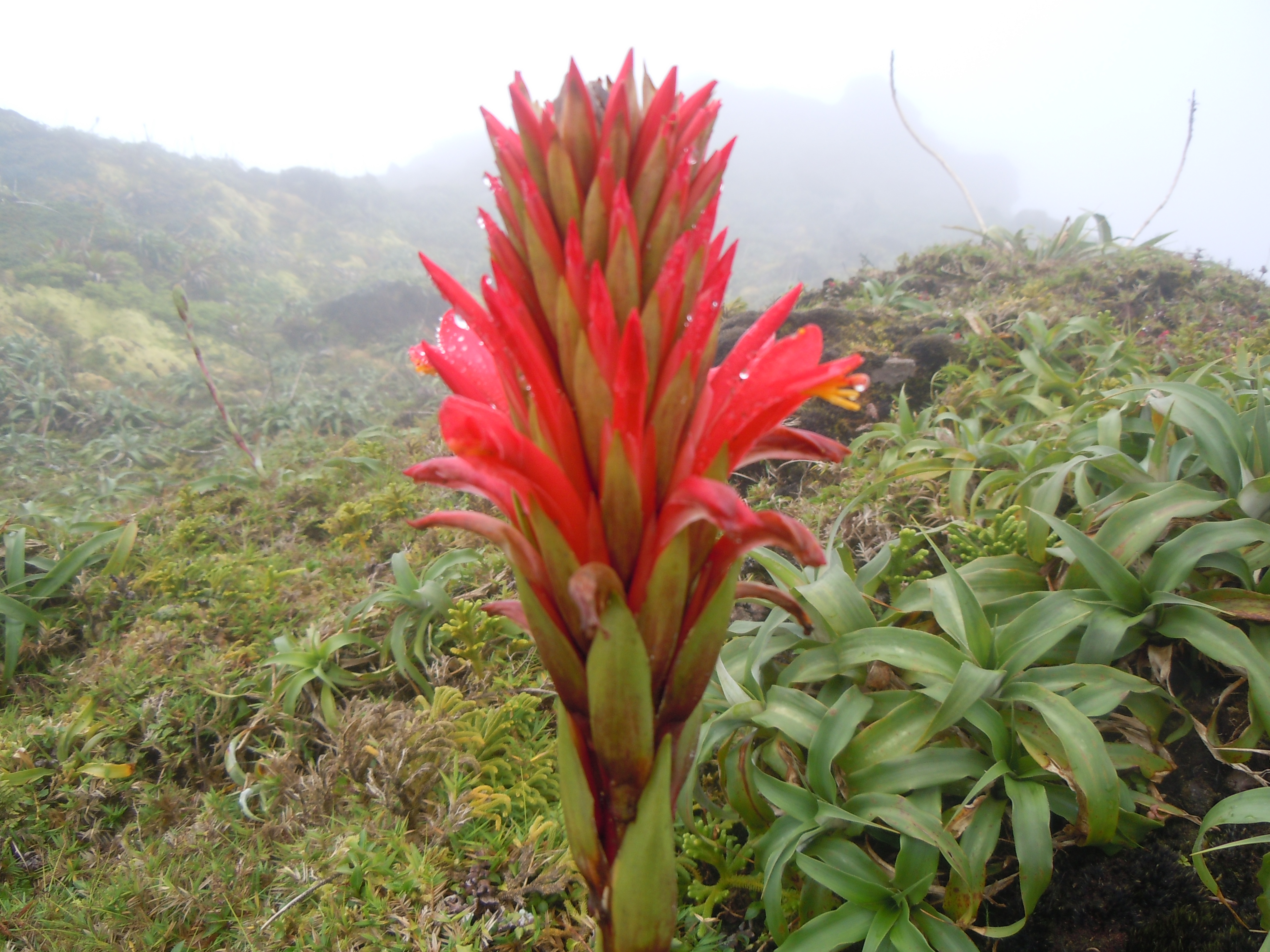 Pitcairnia bifrons inflorescence, La Soufrière, Guadeloupe